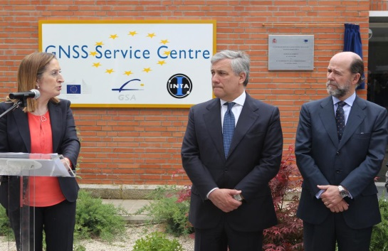 Inauguración del GSC